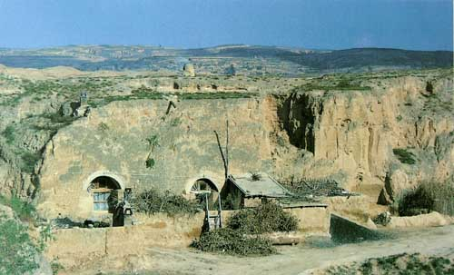 In den Löss gebaute Wohnungen bei Yulin (Nord-Shaanxi, China)